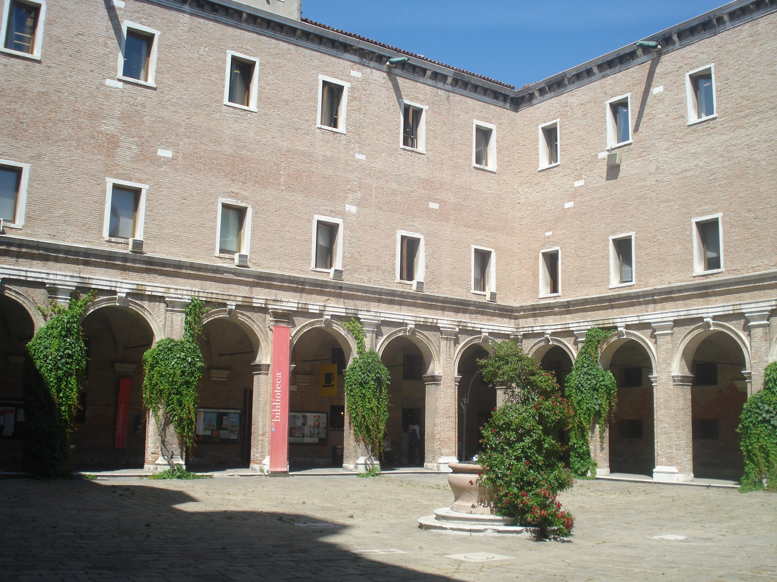 Facoltà di Design e Arti, Università IUAV di Venezia